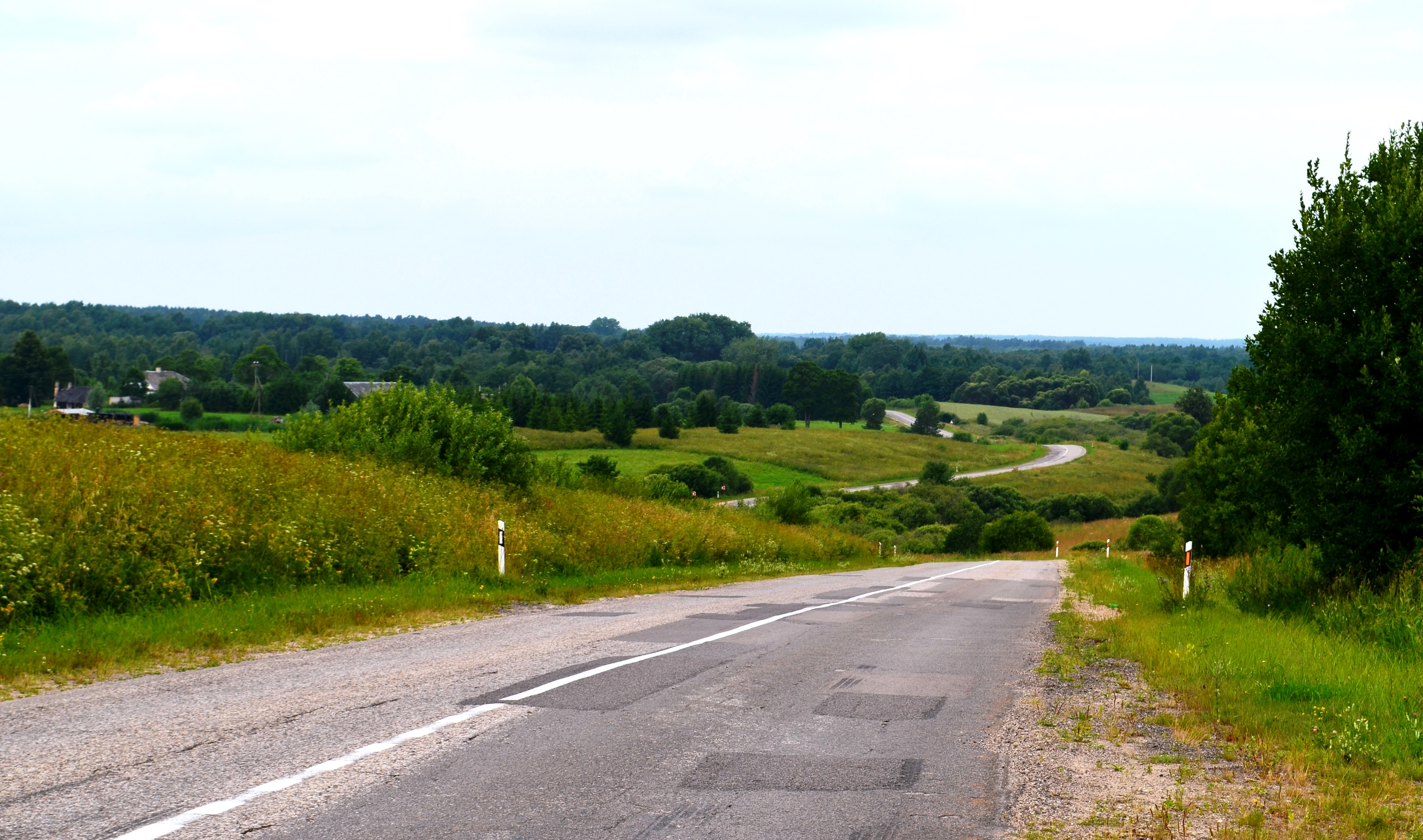 Krašto kelias 172, Šarkiškių apylinkės, Molėtų r.